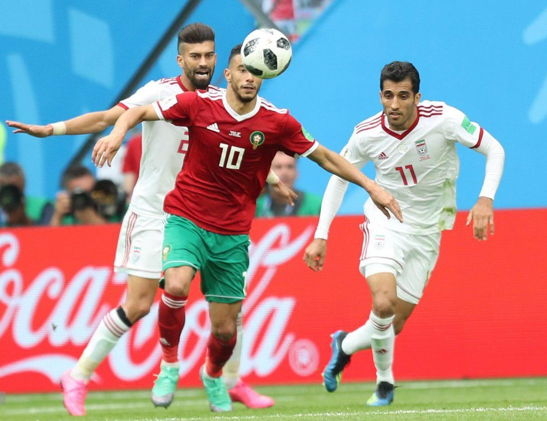 بازی تیم فوتبال ایران و مراکش در جام جهانی ۲۰۱۸